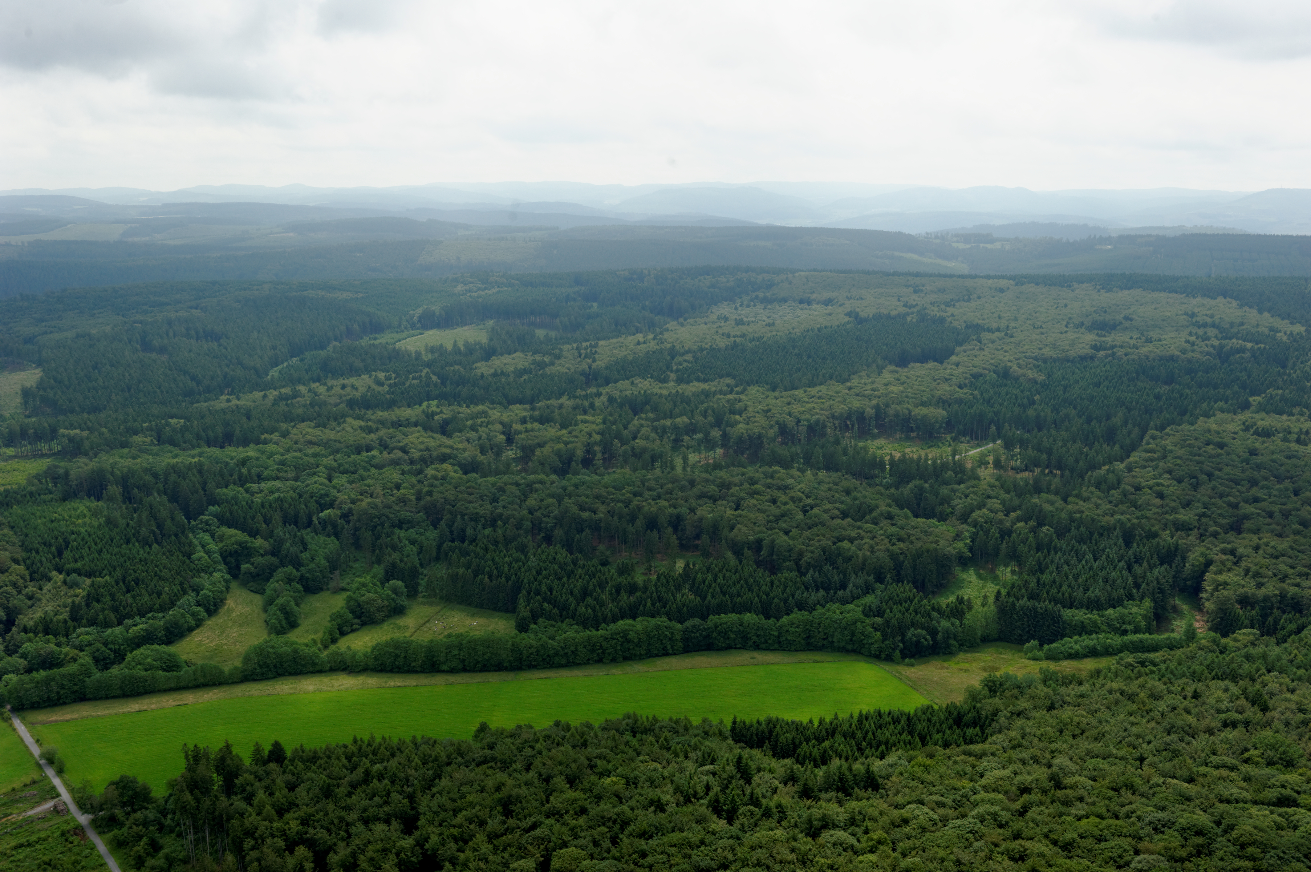 Fotoflug Sauerland Nord. Arnsberger Wald aus Richtung Warstein. The making of this document was supported by the Community-Budget of Wikimedia Germany.